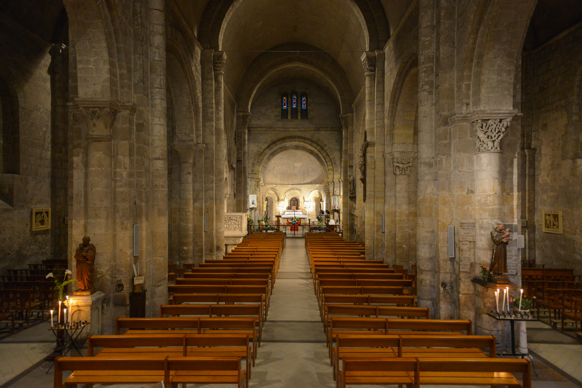 Basilique Notre-Dame-de-la-fin-des-Terres, Soulac-Sur-Mer, Gironde, France